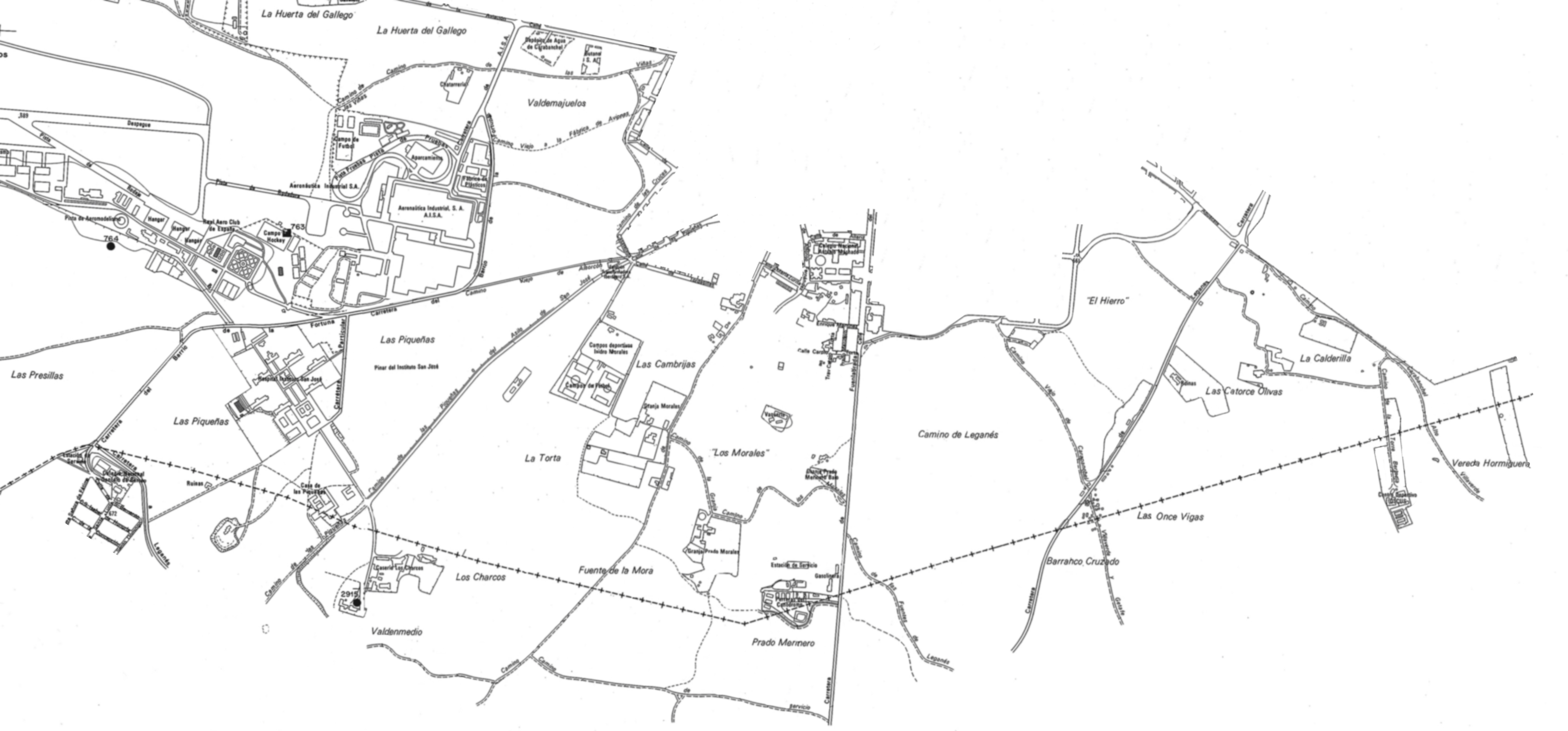 Mapa de segunda mitad del siglo XX del lugar sonde posteriormente se construyó el actual Barrio de La Peseta, al oeste de Madrid